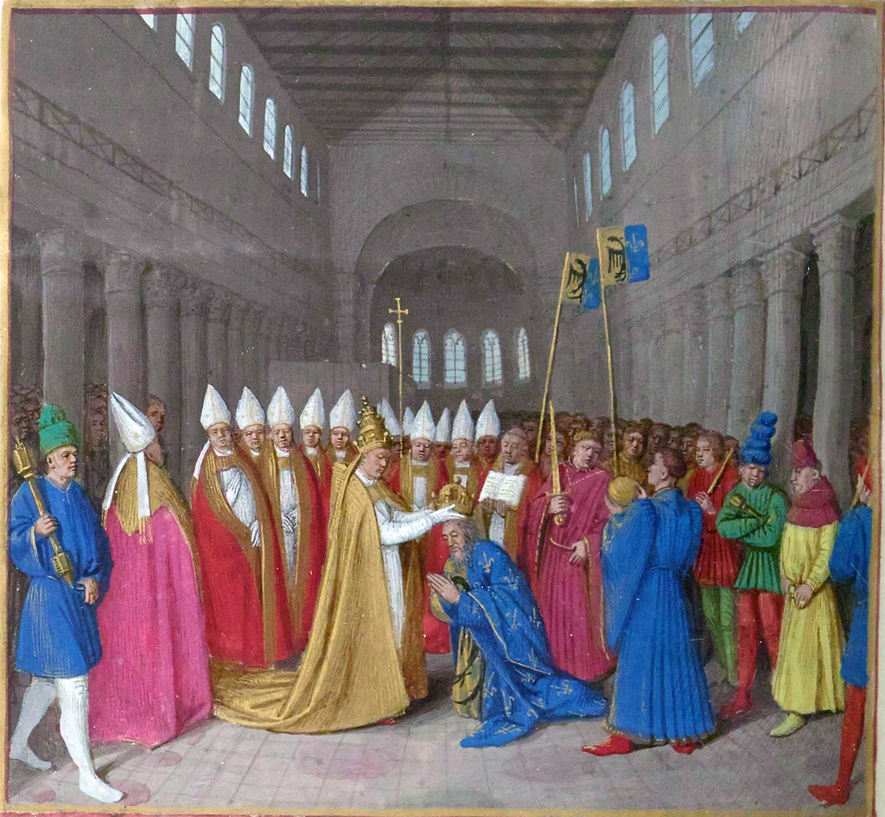 Le 25 décembre de l'an 800, à Saint-Pierre de Rome, Charlemagne est couronné empereur par le pape Léon III. Grandes Chroniques de FranceParis, BnF, département des Manuscrits, Français 6465, fol. 89v. (Second Livre de Charlemagne)